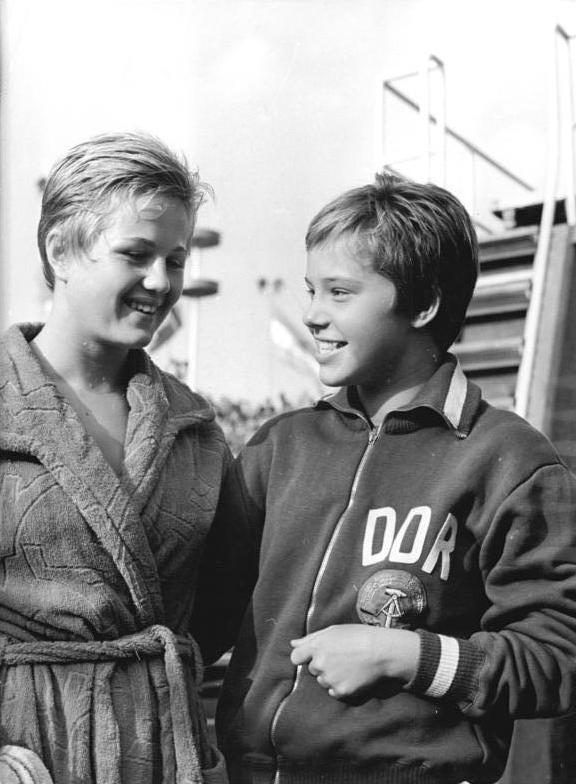 Zentralbild Sd-Kt 23.8.1962 X. Europameisterschaften im Schwimmen, Springen und Wasserball 1962 in Leipzig. Damen-Finale im Turmspringen am 23.8.62. UBz.: Die glückstrahlenden Kunstspringerinnen aus der DDR. Links Goldmedaillengewinnerin Ingrid Krämer. rechts die 15jährige Christiane Lanzke, die die Silbermedaille gewann.